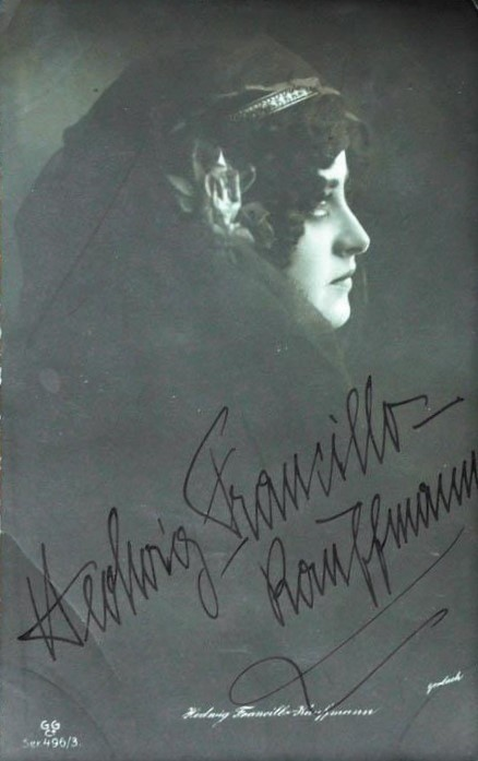 Hedwig Francillo-Kauffmann, signierte Autogrammpostkarte, c. 1915